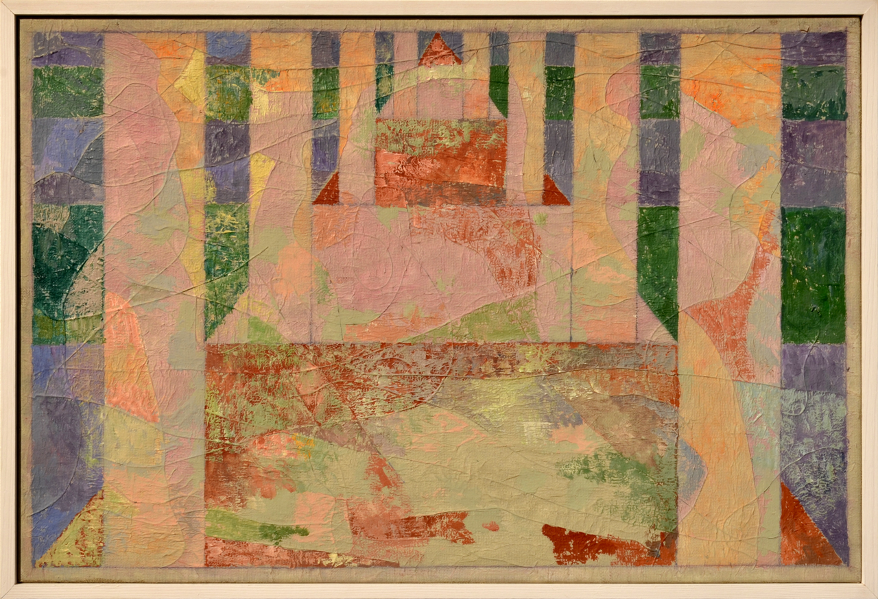 Jiří Mrázek, Růžová pyramida, akryl, plátno, 40x60cm, přelom 80-90. let